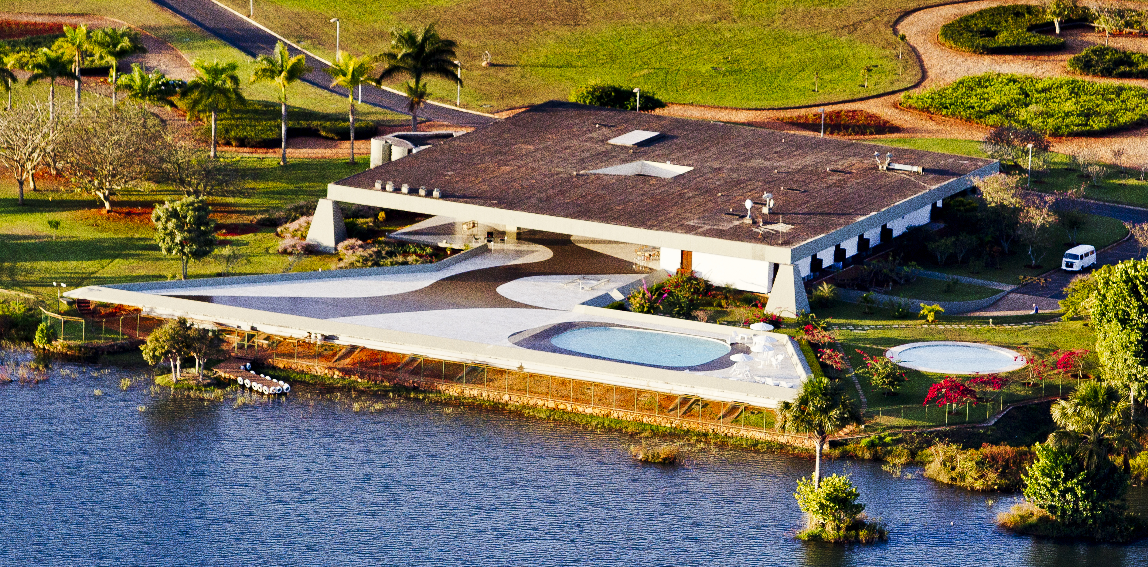 Brasíia-DF, 29/06/2011. Palácio do Jaburu. Foto: Ichiro Guerra/PR.